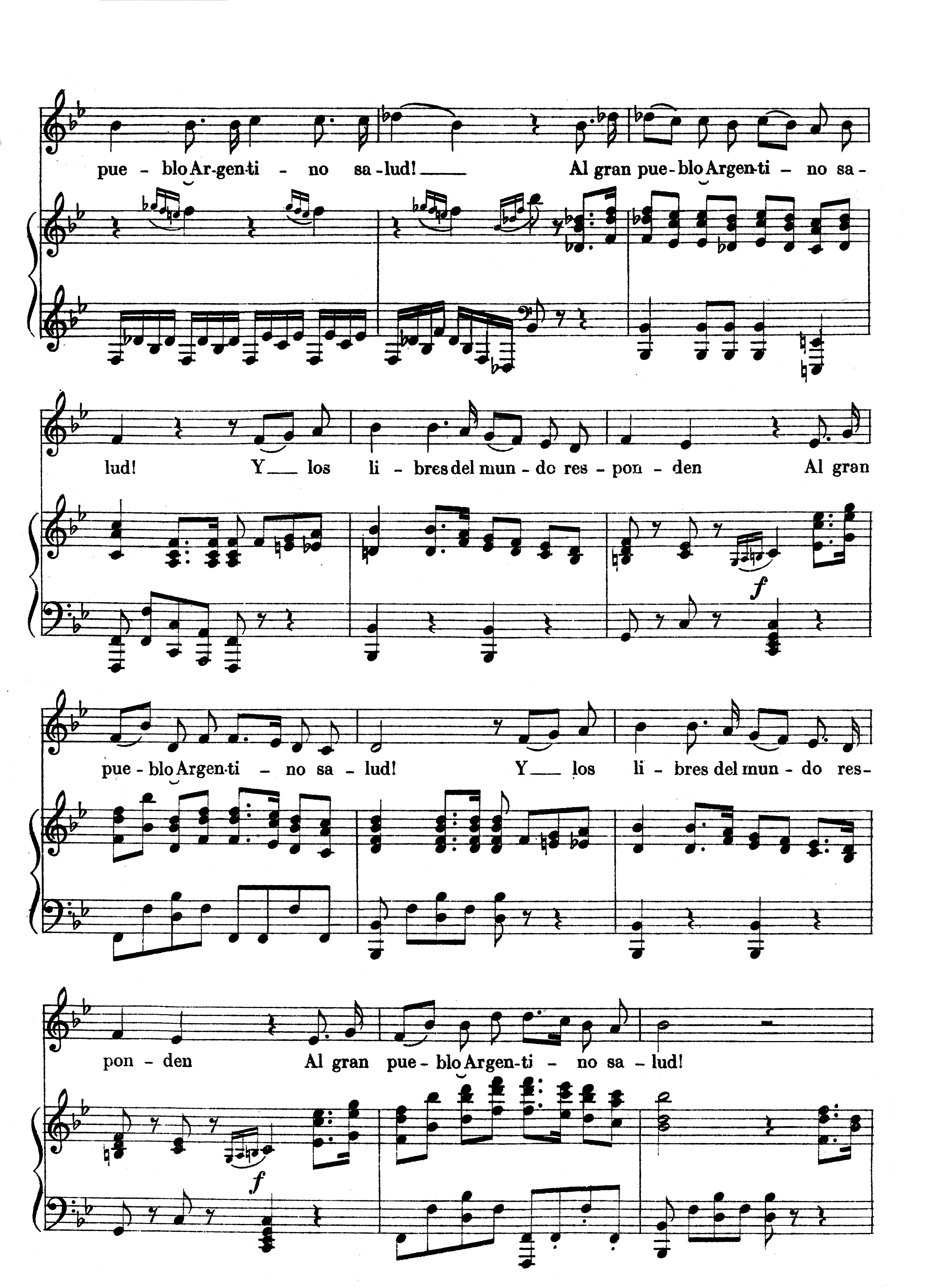 Partitura canto y piano página 3/5